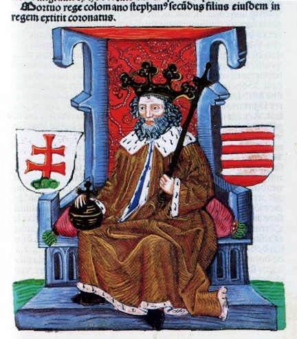 Stefan II, król Węgier